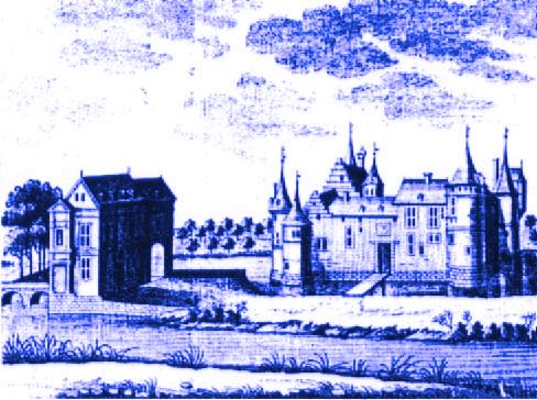 door mezelf ingekleurde ets uit 1740 van Remacle Leloup